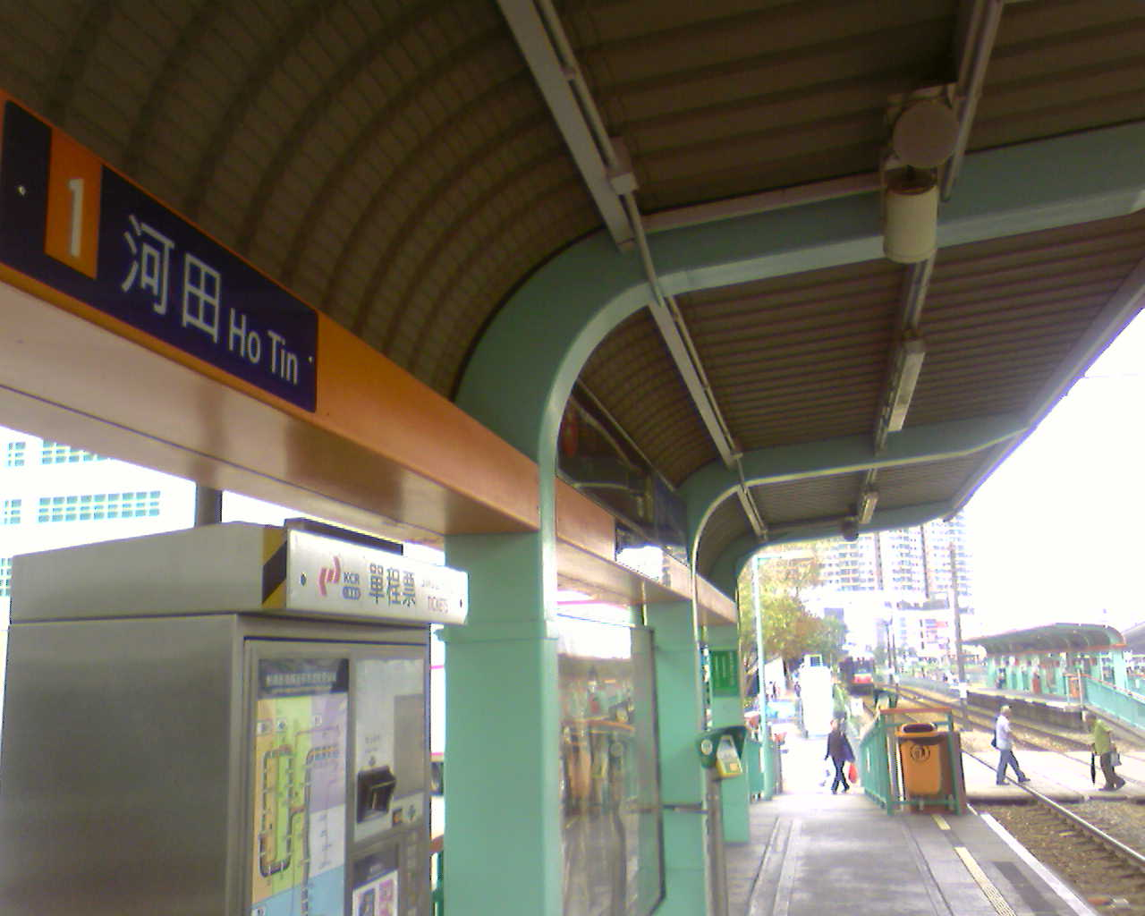 中文（香港）: 輕鐵河田站，攝於該站1號月台。